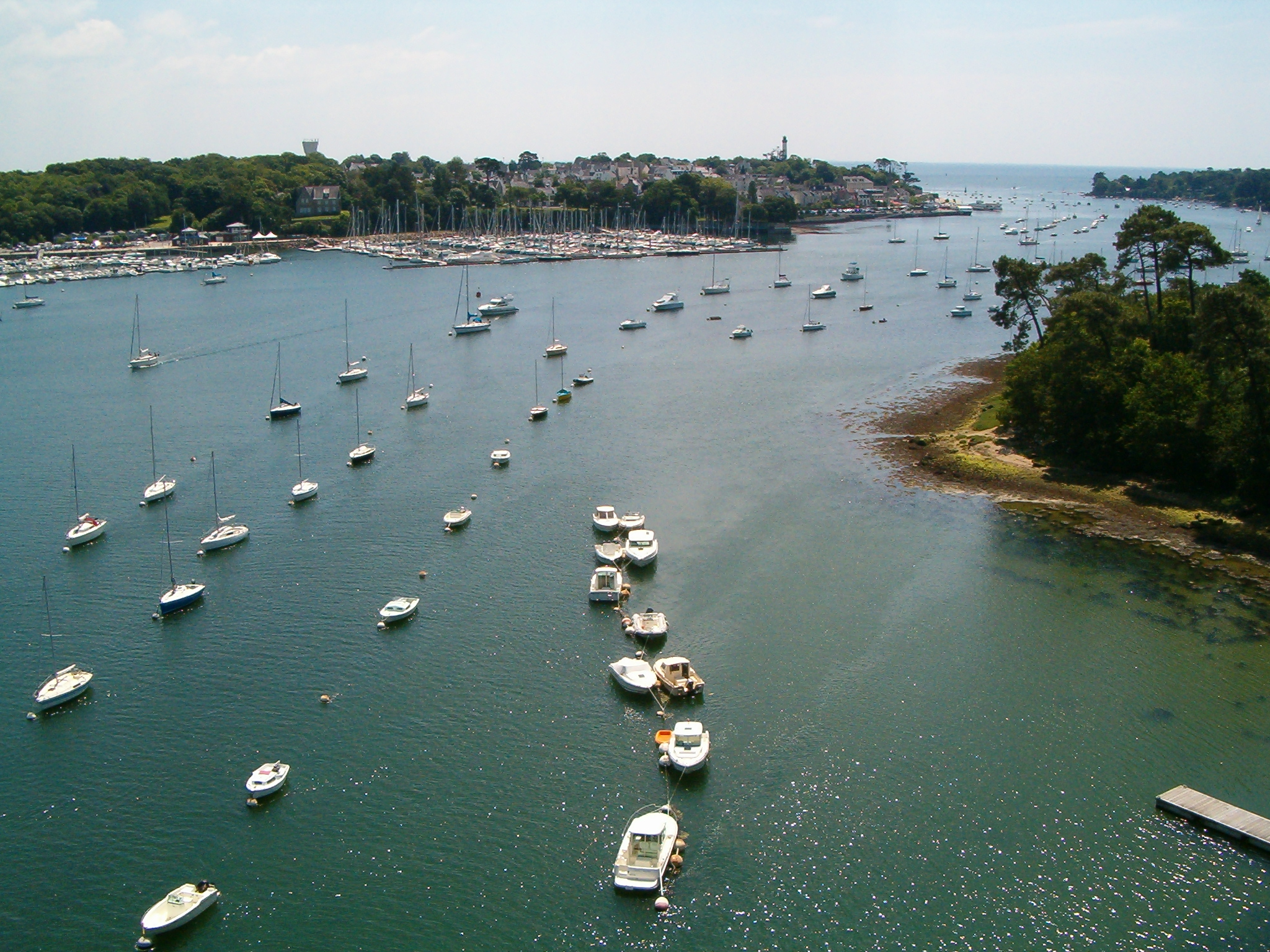 Monding van de Odet in Benodet. Bénodet et l'Odet vus du pont de Cornouaille